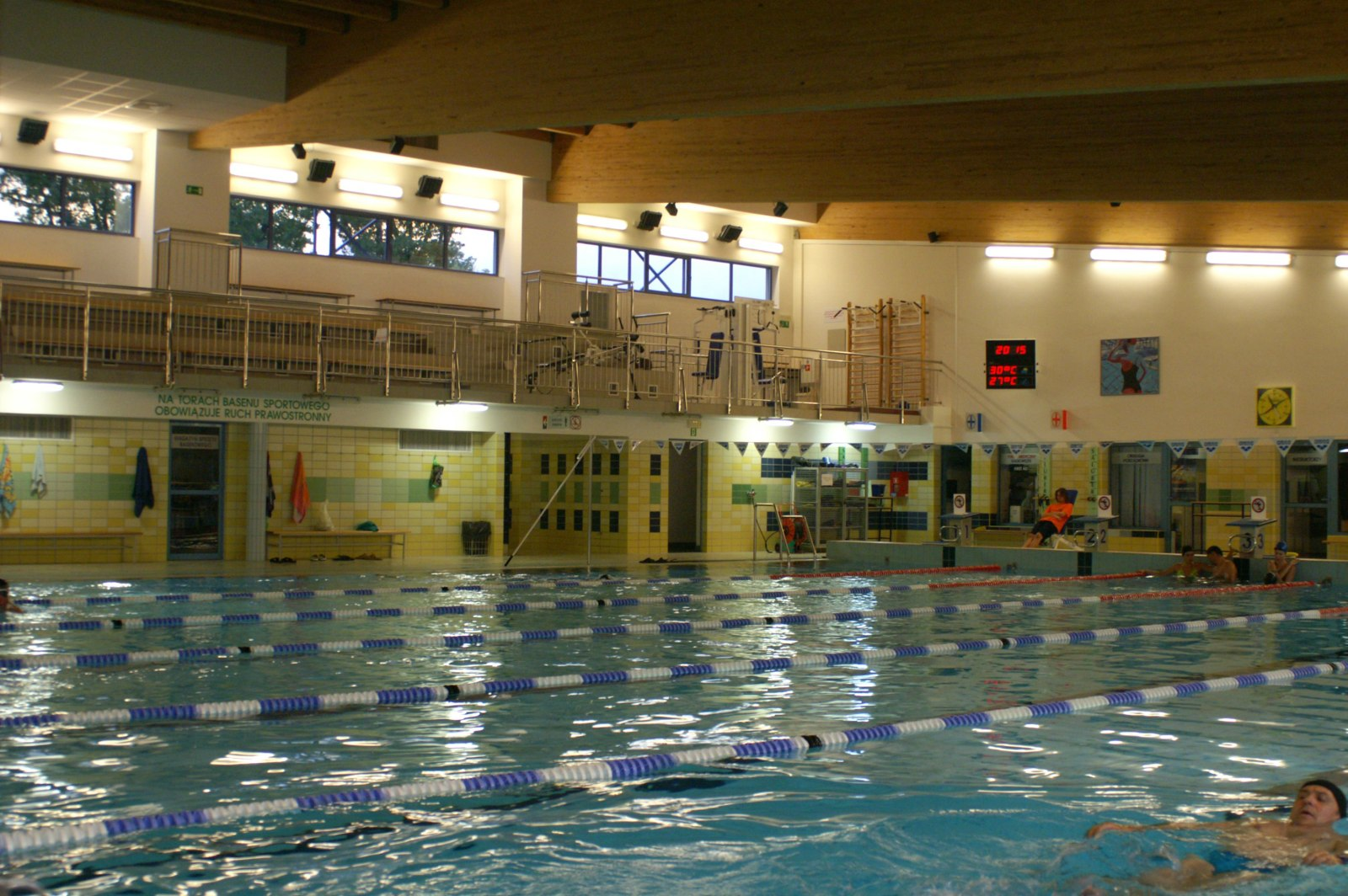 Basen Olimpijski we Wrocławiu